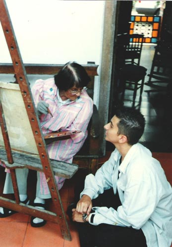 Foto de Debora Arango con su alumno Joaquin Restrepo